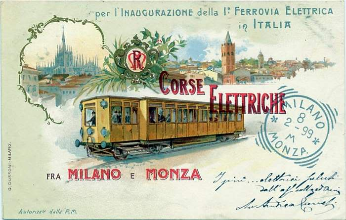 Cartolina commemorativa dell'inaugurazione dell'esercizio a trazione elettrica (con automotrici ad accumulatori) sulla linea Milano-Monza, ad opera della Rete Mediterranea.